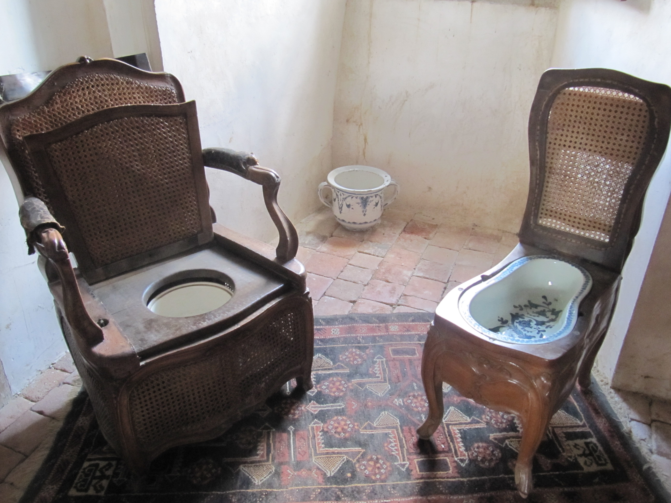 Fauteuil à l'anglaise avec sa réserve d'eau cachée dans l'épaisseur du dossier et bidet (Château de Villemonteix dans la Creuse)